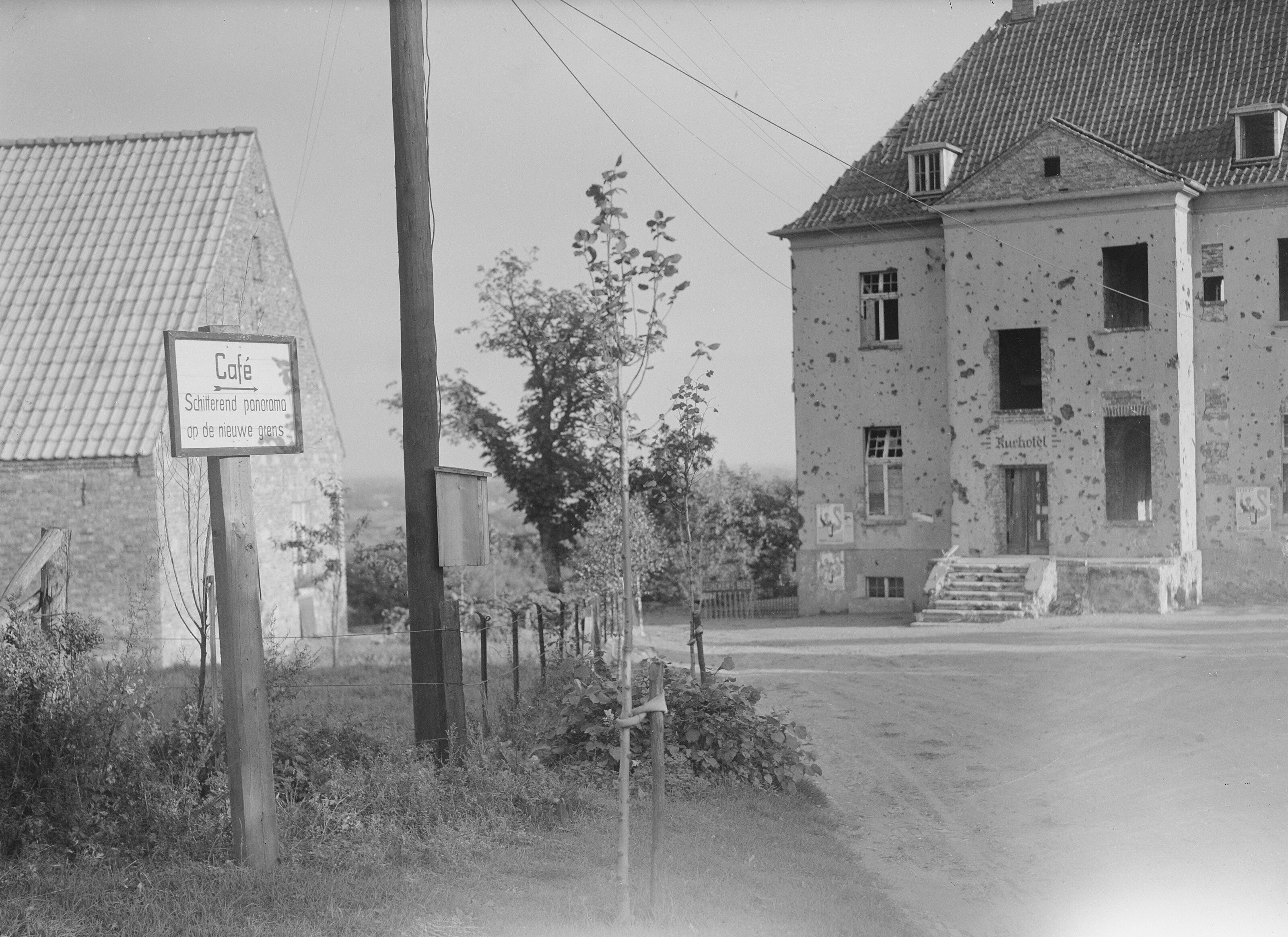 Collectie / Archief : Fotocollectie Anefo Reportage / Serie : [ onbekend ] Beschrijving : Elten na halfjaar "correctie" Datum : 21 oktober 1949 Locatie : Elten Fotograaf : Oorschot, […] van / Anefo Auteursrechthebbende : Nationaal Archief Materiaalsoort : Glasnegatief Nummer archiefinventaris : bekijk toegang 2.24.01.09 Bestanddeelnummer : 903-6647